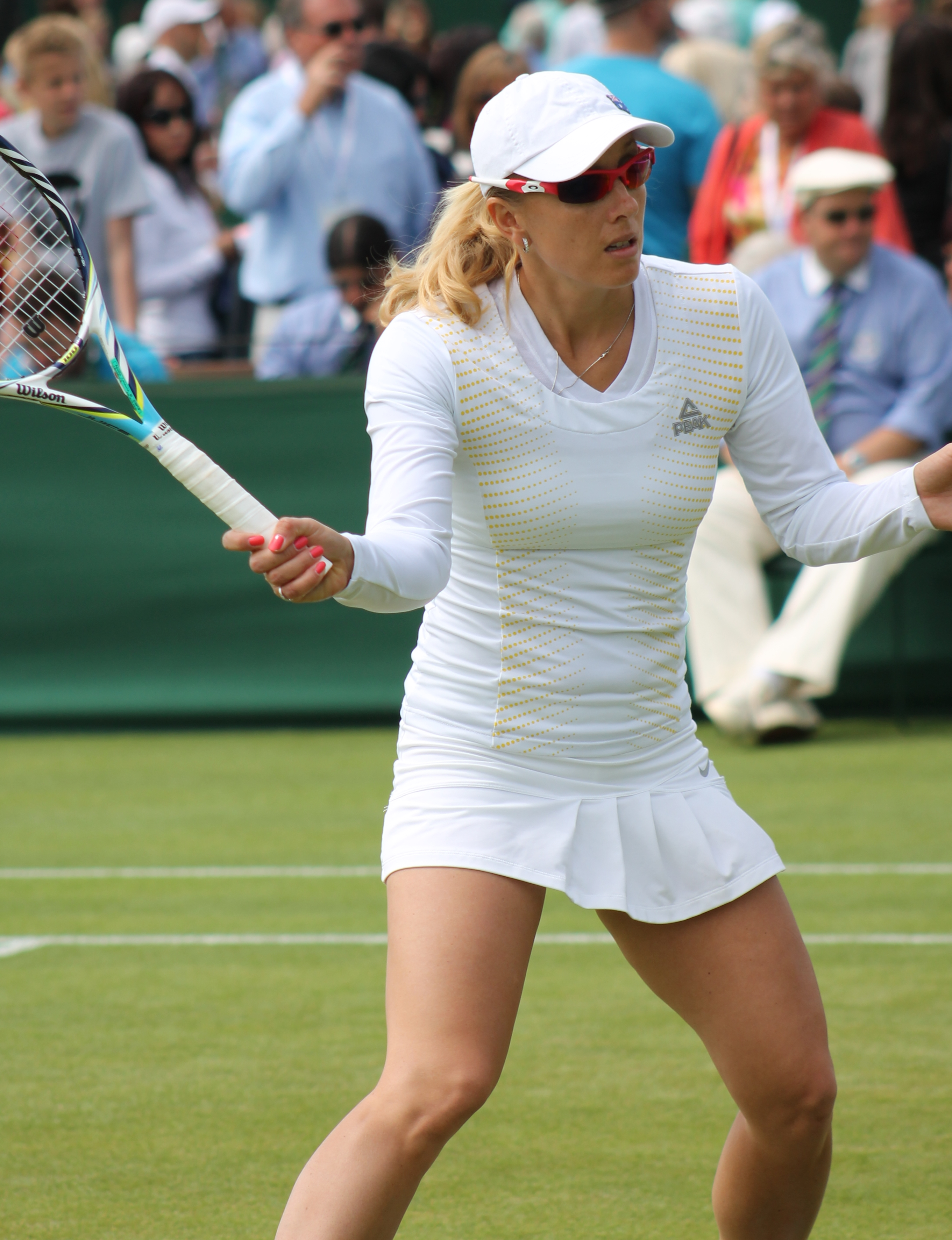 Anastasia Rodionova at 2013 Wimbledon